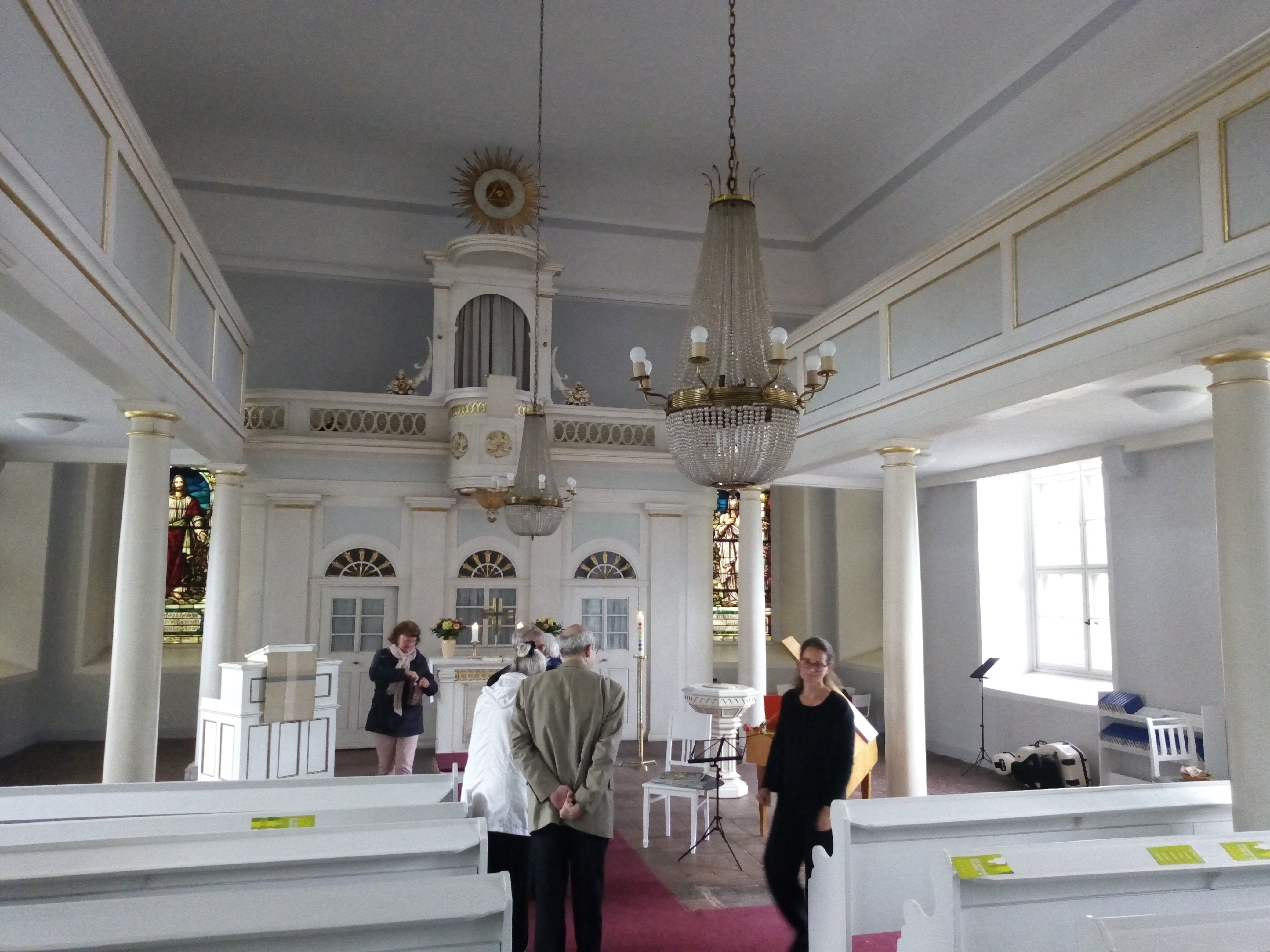 Martinikirche, Erfurt-Ilversgehofen, Kanzelaltar